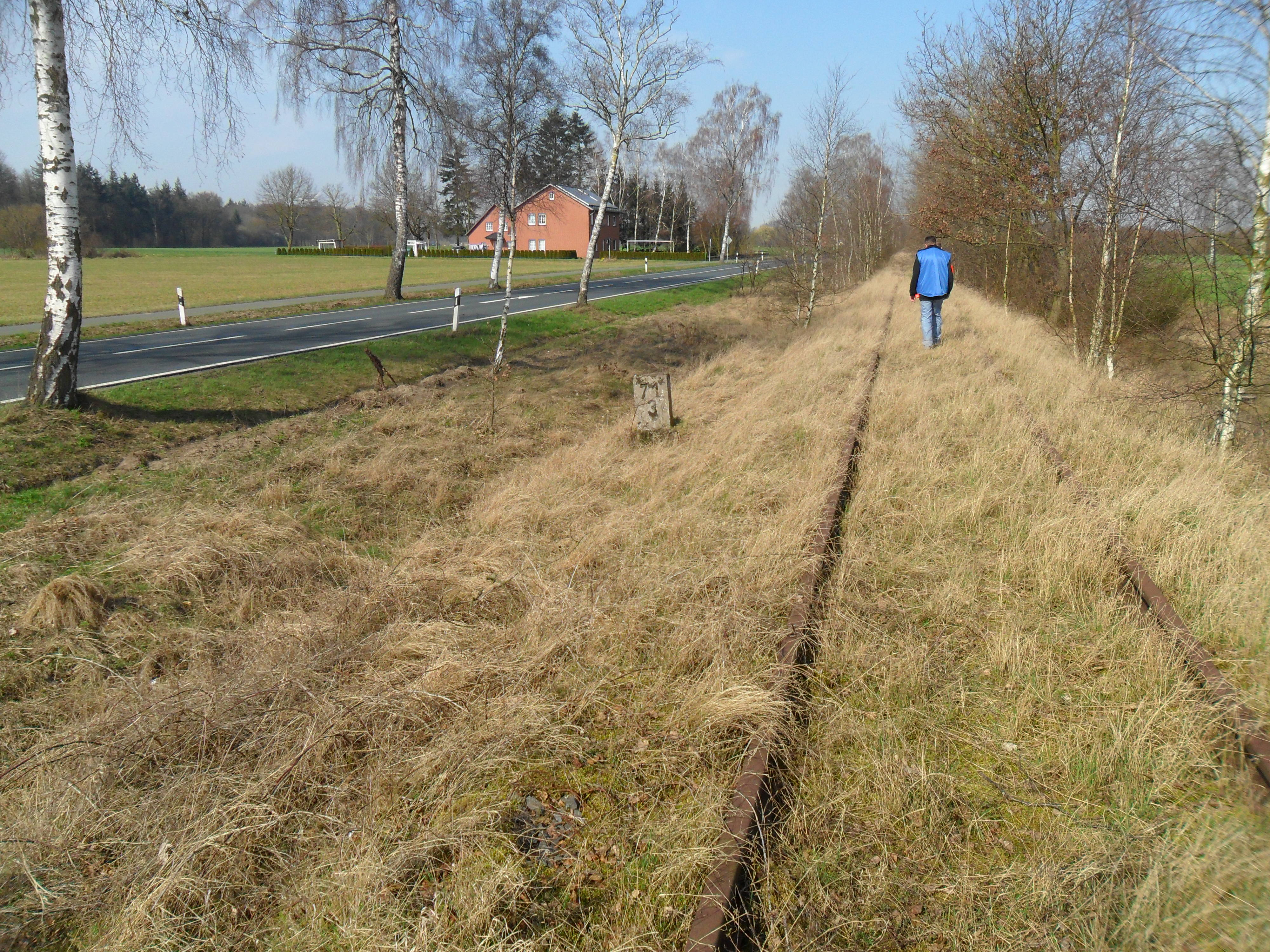 Streckenkilometer 71,3 der Bahnstrecke 2982 Bünde - Bassum, zwischen Sulingen und Schaförden ist die Strecke aktuell stillgelegt